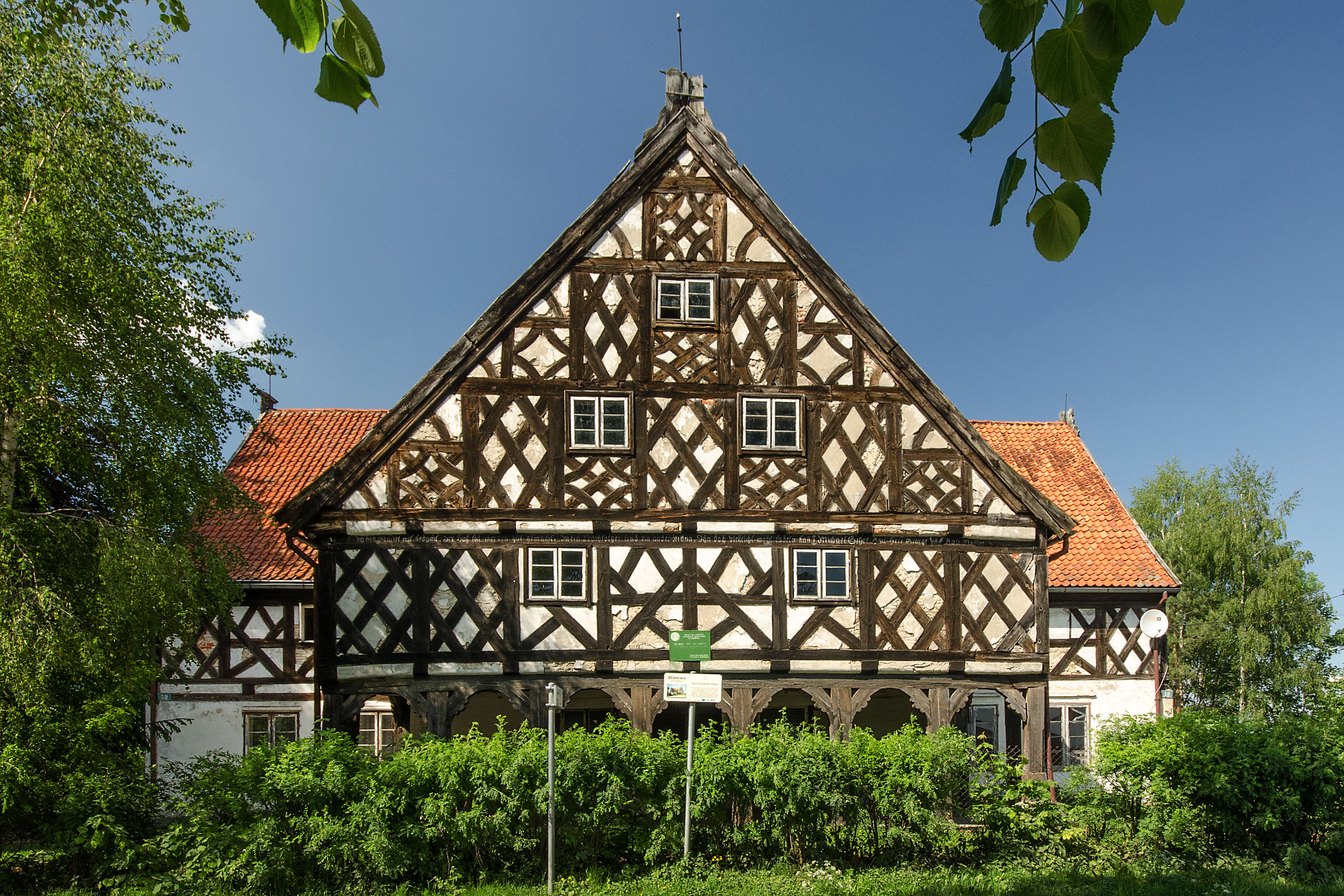 Stalewo, dom podcieniowy nr 14 (wg KB - 17a)